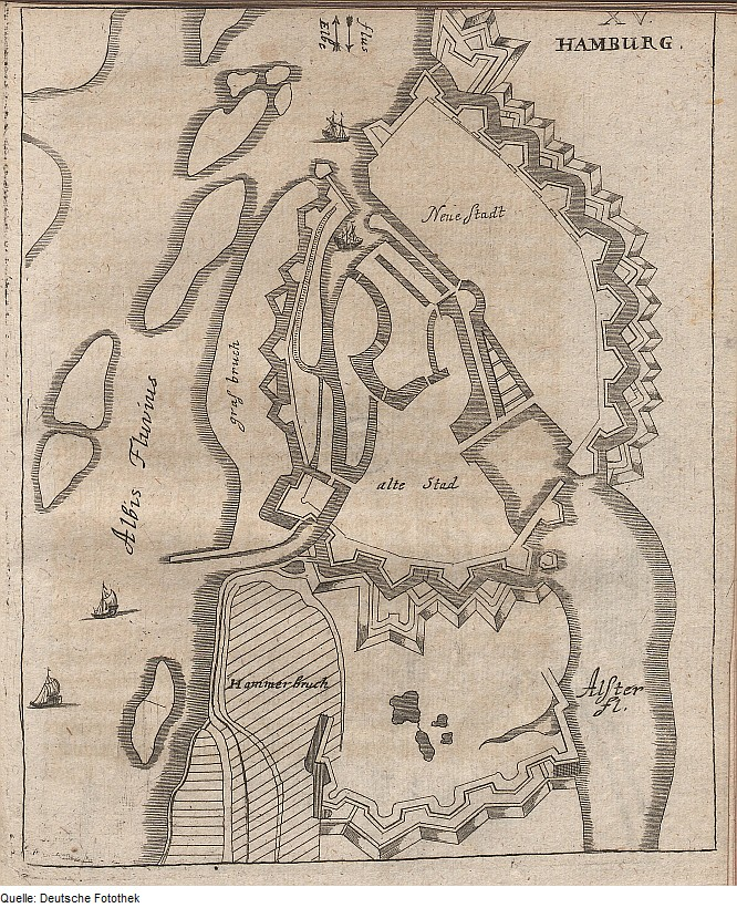 Original image description from the Deutsche FotothekArchitektur & Festungsbau